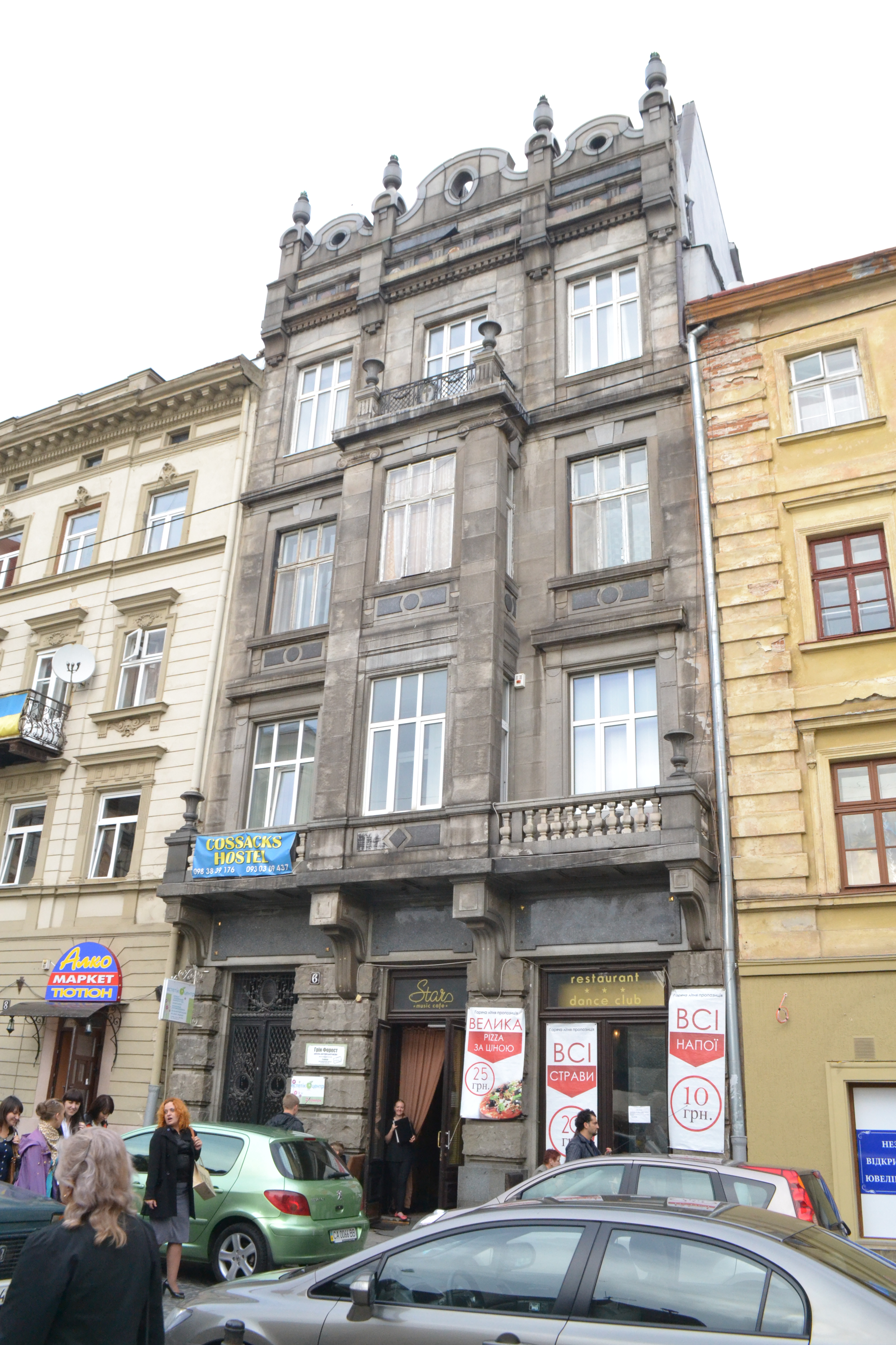 житловий будинок, Львів, Театральна, 6